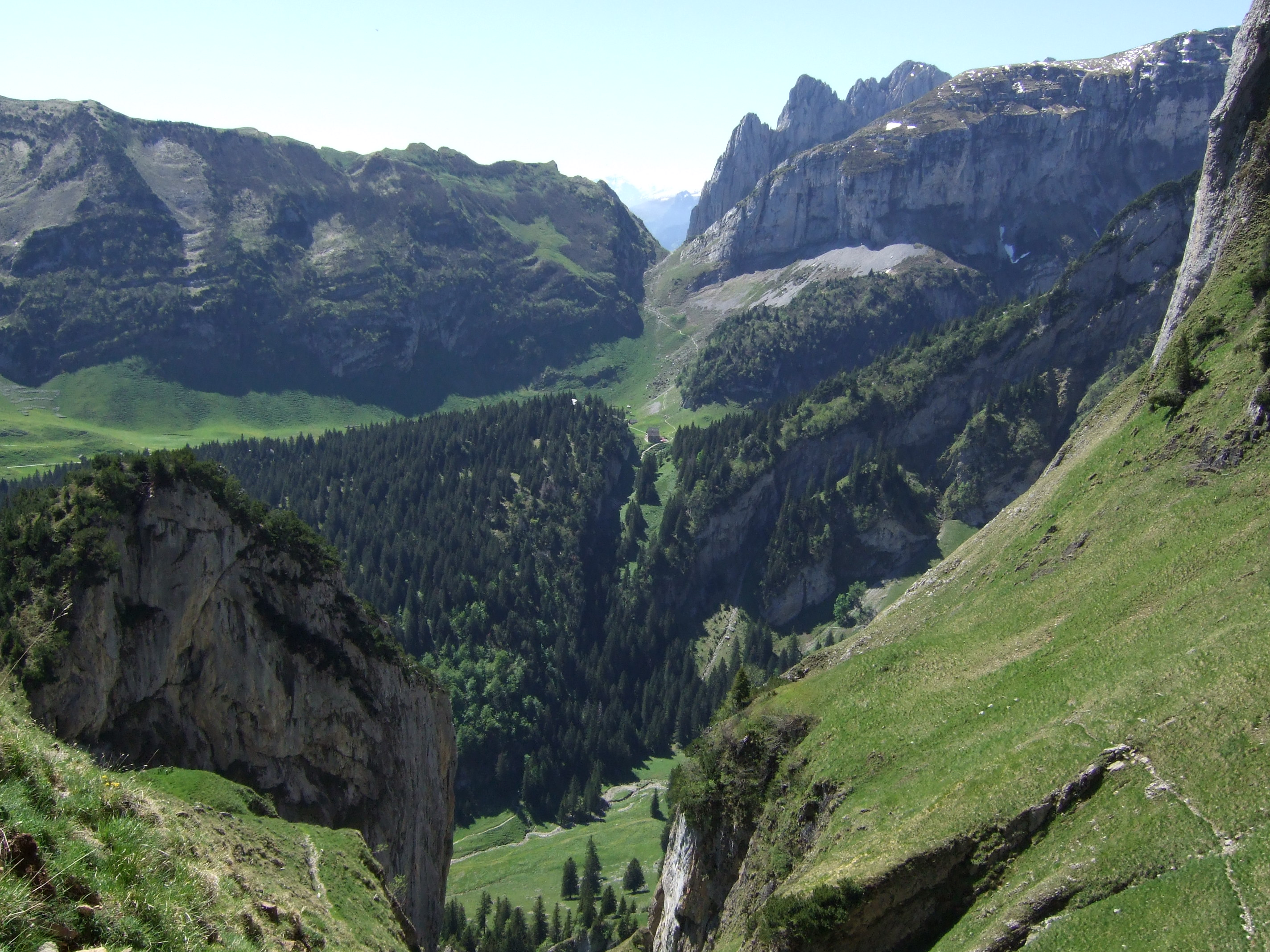 Bollenwees, Alpstein, Switzerland, Schweiz